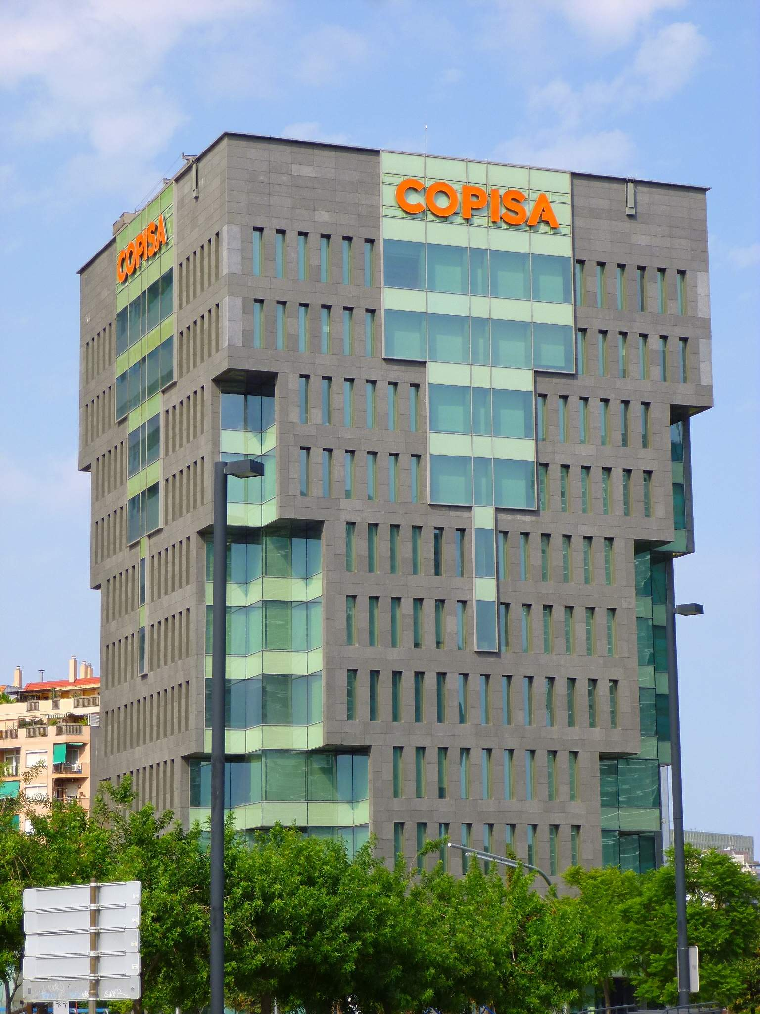 Torre Copisa (Hospitalet de Llobregat)